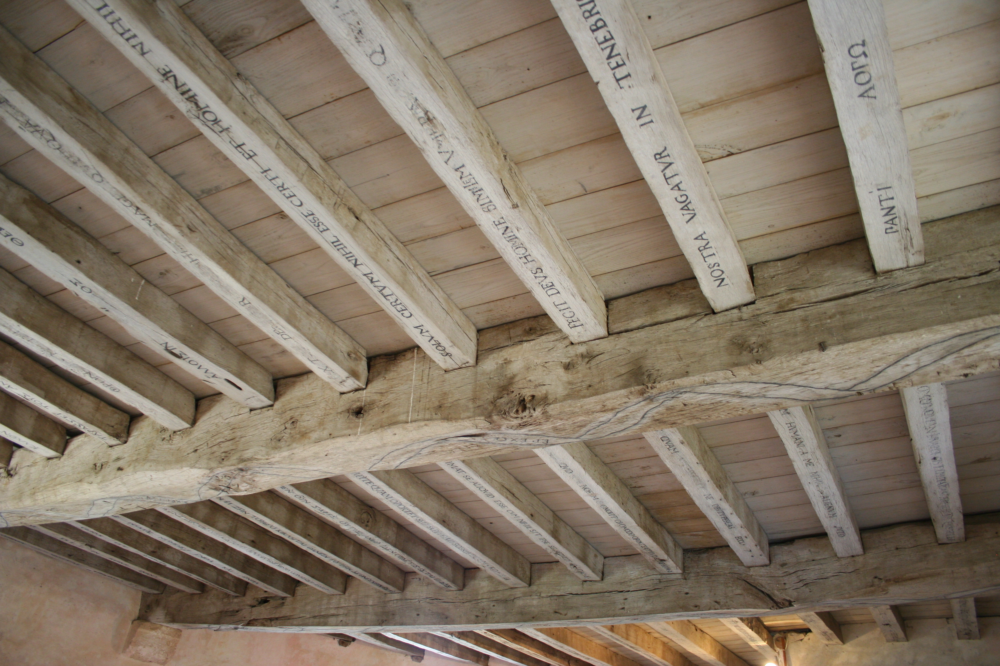 Plafond de la bibliothèque de Montaigne au château de Montaigne.